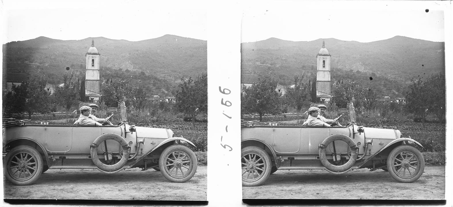 Absis i campanar de l'església d'Amer. Josep Salvany i Blanch (1914)